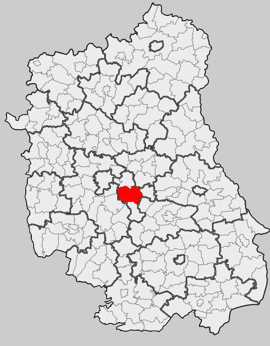 Map of gmina Piaski, Świdnik county, Lublin voivodship Mapa gminy Piaski, powiat świdnicki, województwo lubelskie